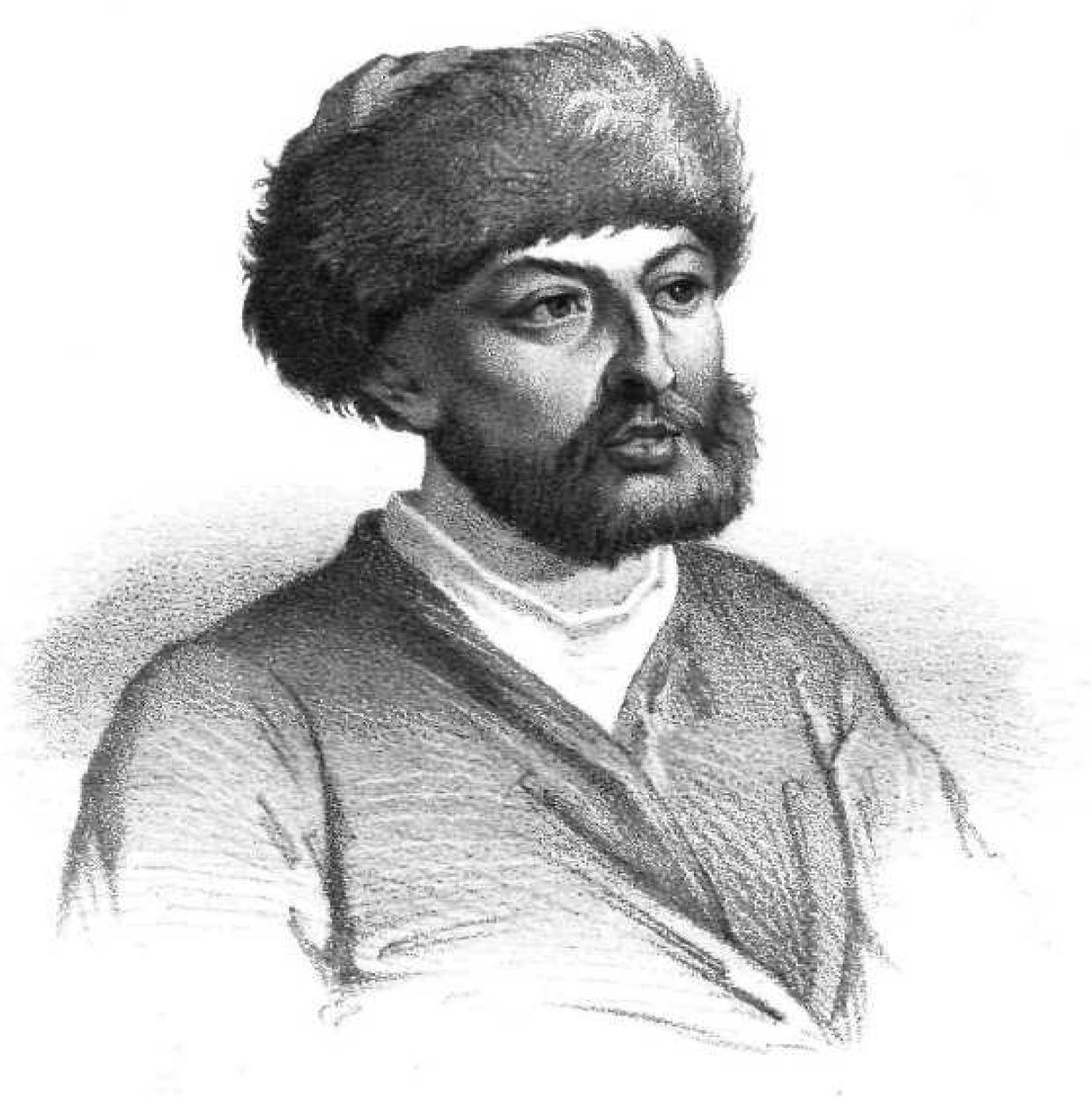 Alexander Maurokordatos (1641-1709), Politiker, 17.-18. Jahrhundert